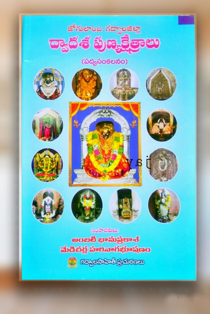 జోగులాంబ గద్వాల జిల్లా పుస్తకాలు